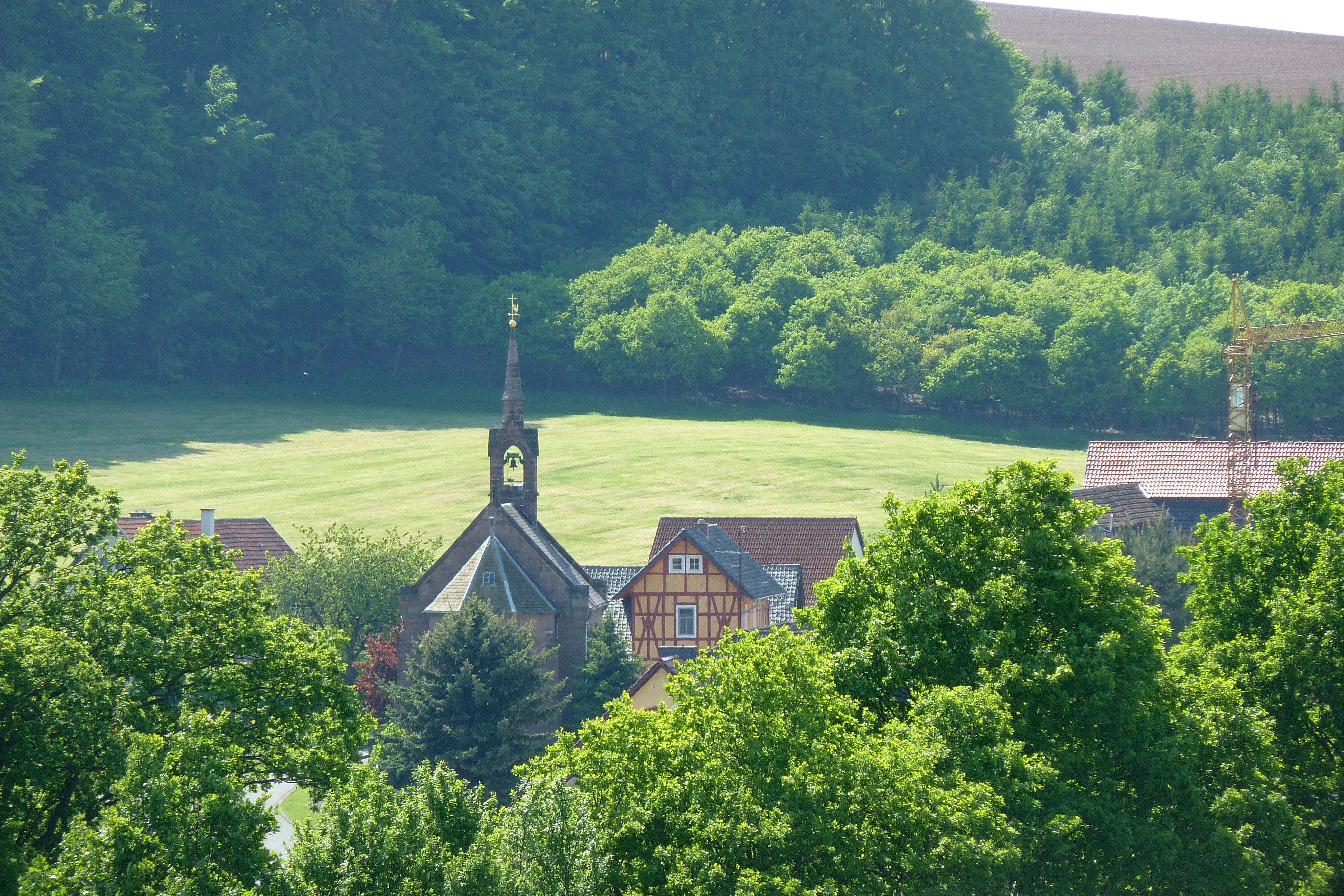 Blick von Nordosten auf Streitholz mit Kirche